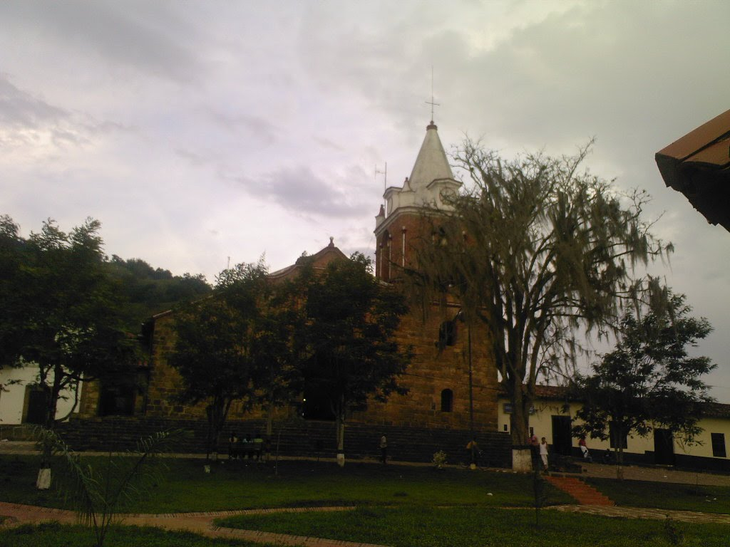 Iglesia de Simacota desde el Parque Principal